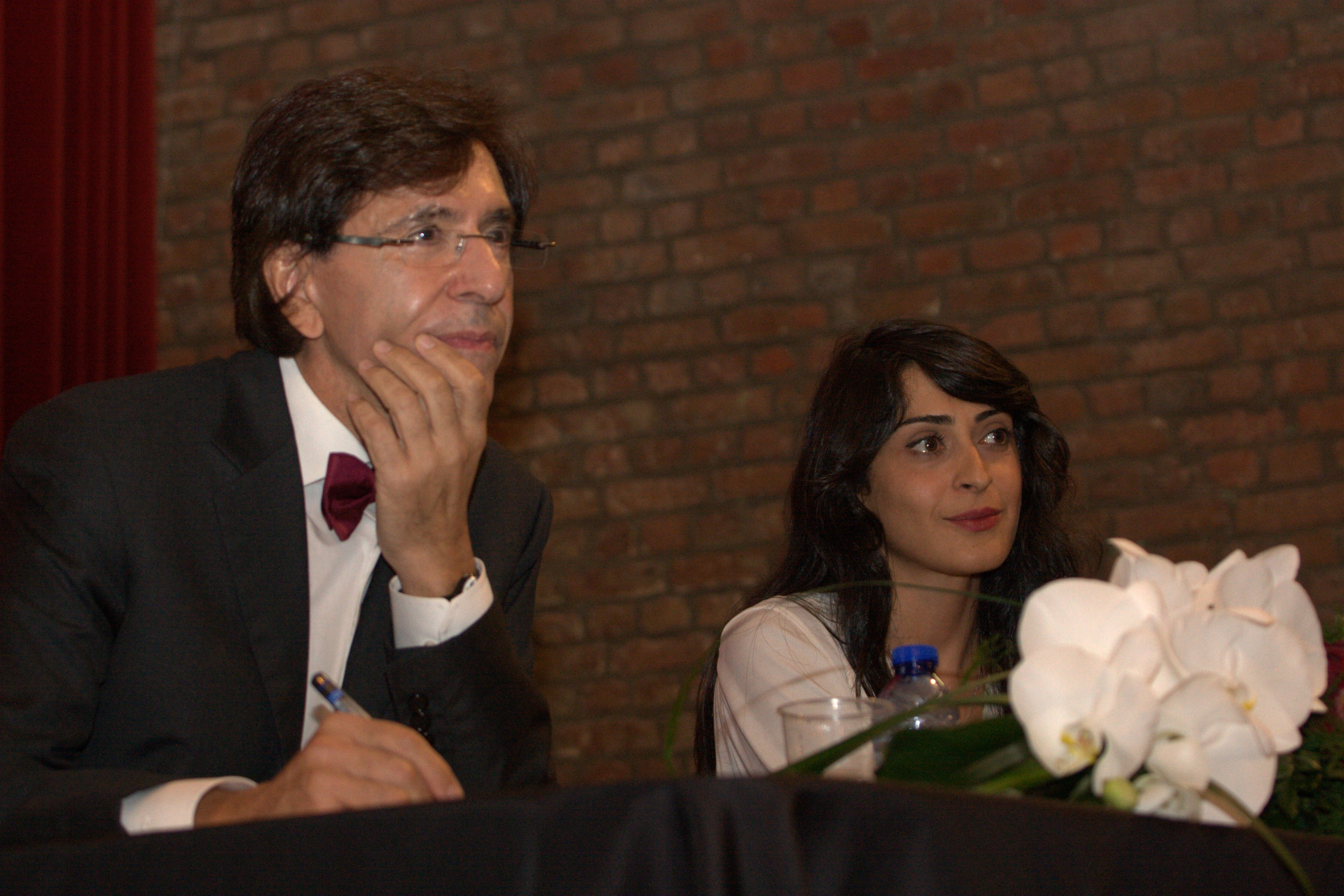 Elio Di Rupo et Özlem lors de "Elio répond à vos questions"